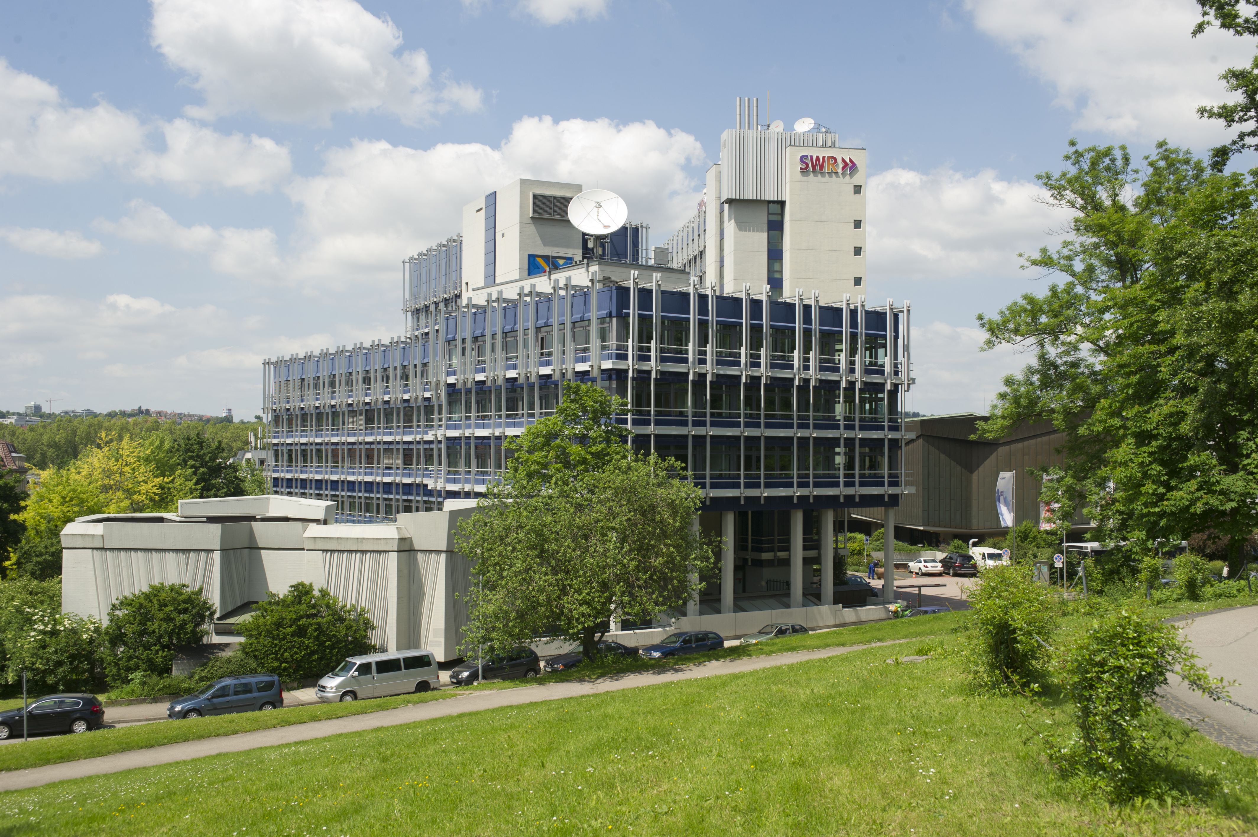 SWR Funkhaus Stuttgart